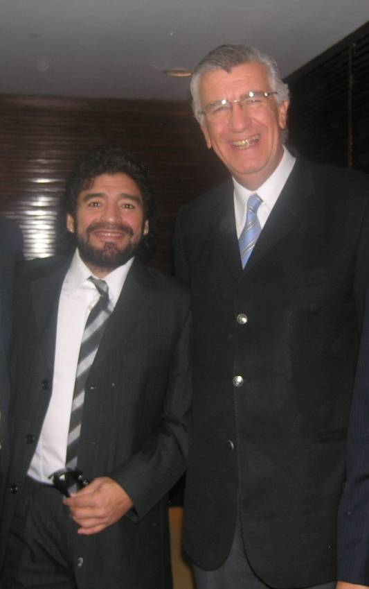 DIEGO ALMANDO MARADONA - JOSE LUIS GIOJA